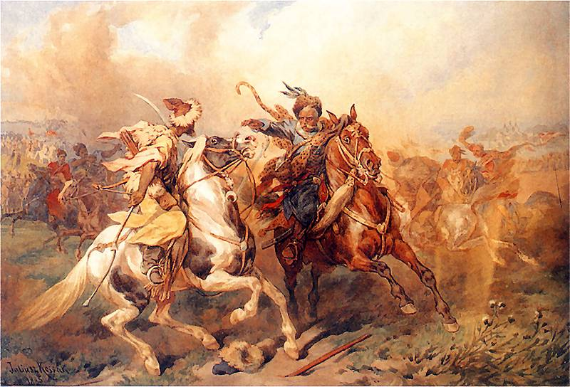 Танець татарський. Битва козаків з татарами